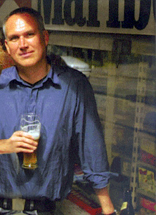 Bild von Heribert Lenz